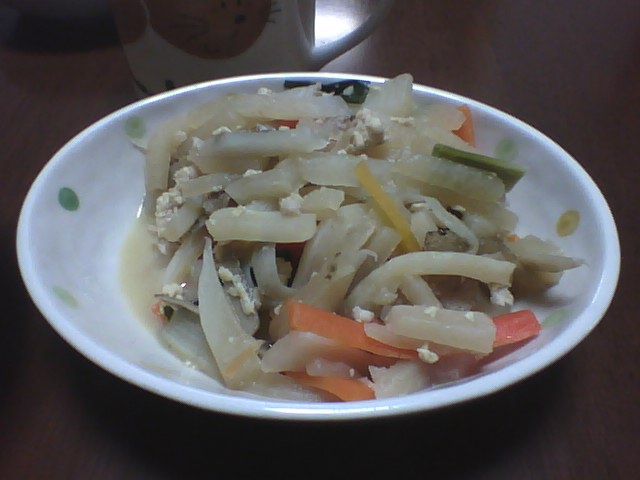 黄飯（おうはん）に一緒に出される加薬（かやく）。